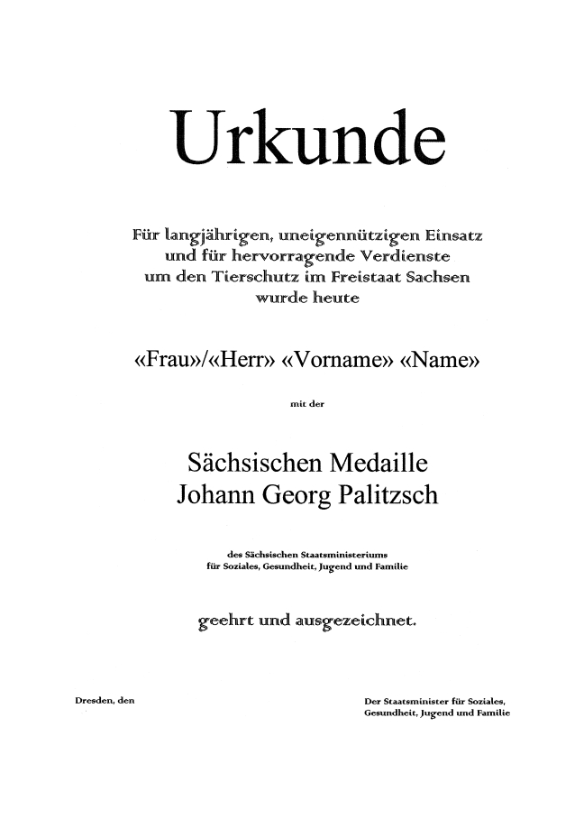 Amtliche Darstellung der Urkunde zur Sächsischen Medaille Johann Georg Palitzsch (Sächsische Tierschutzmedaille)